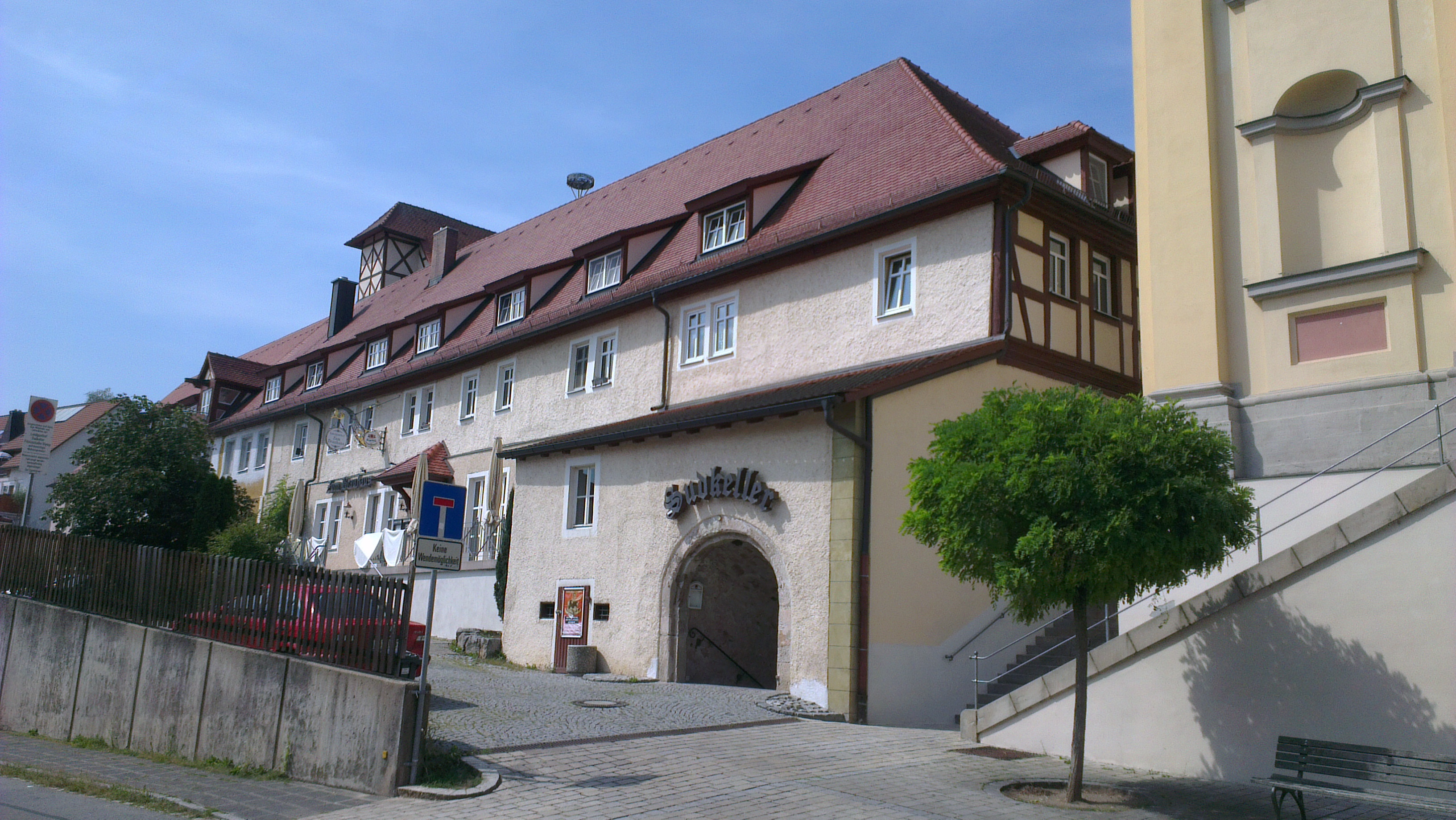 Wilhermsdorf - Ehemaliges Kanzleigebäude des reichsunabhängigen Staates Wilhermsdorf